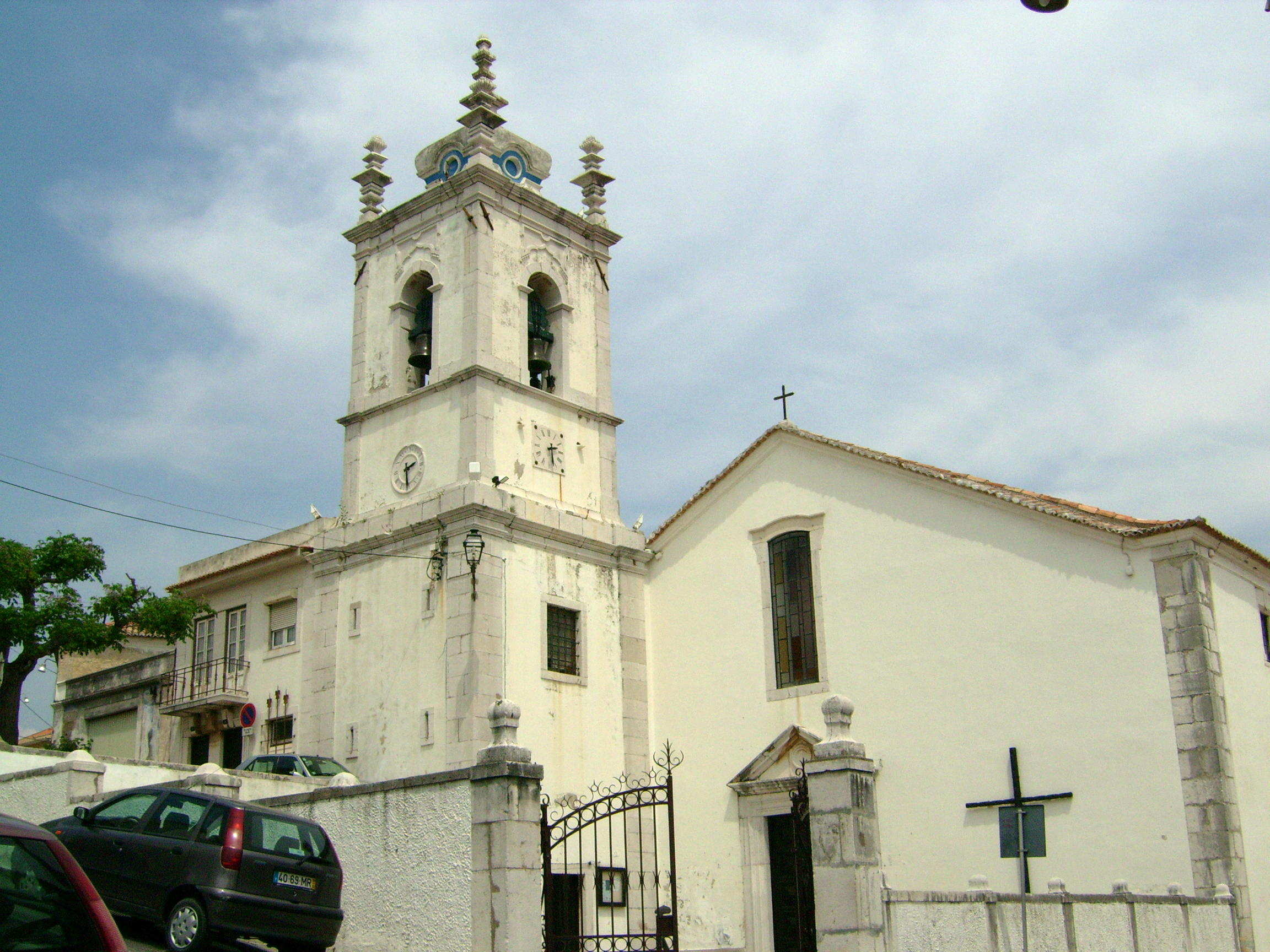 Igreja_Matriz_de_santiago_-_Sesimbra Local : Sesimbra - Portugal user:sacavem (pt) (usuário:sacavem)